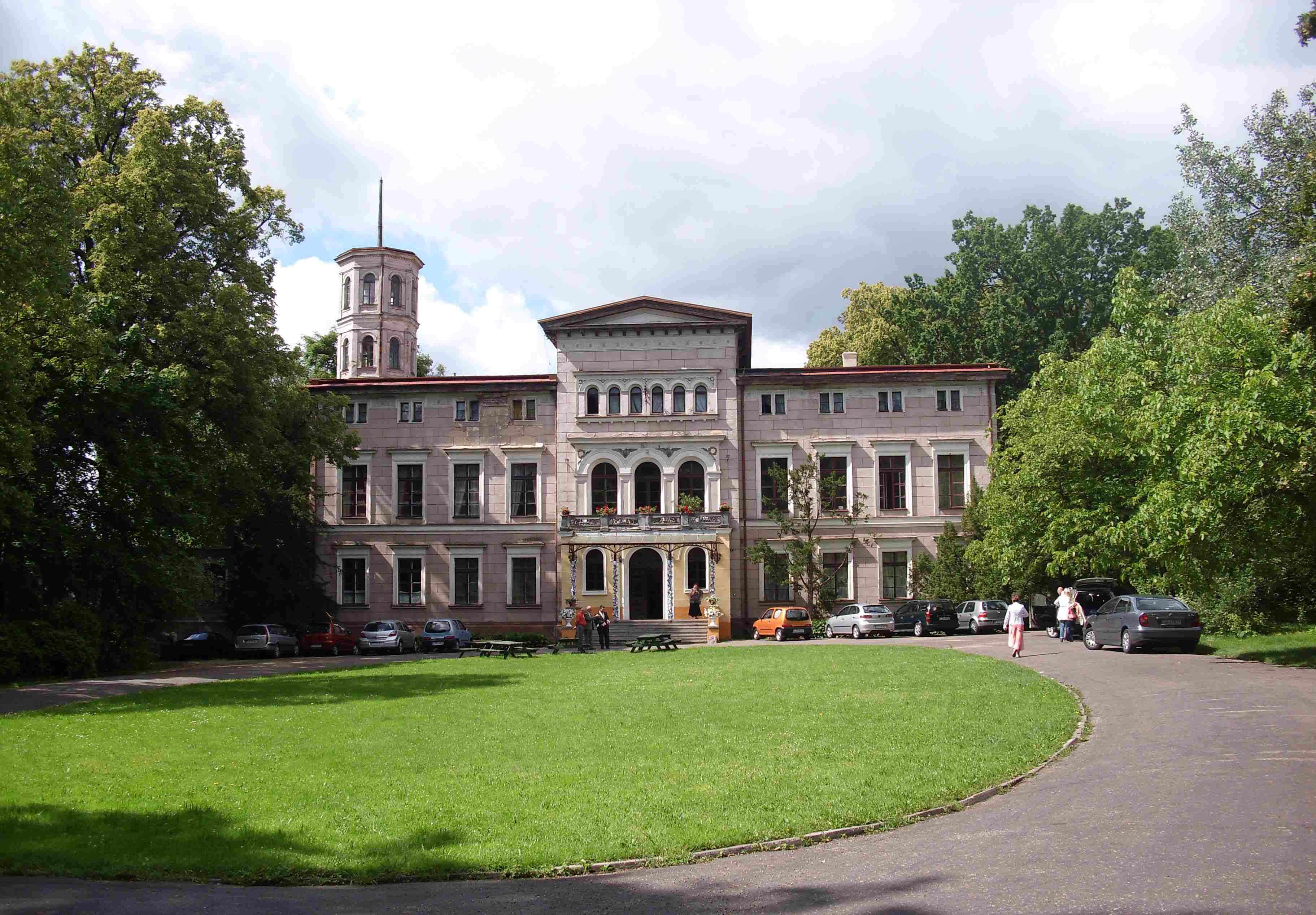 Sypniewo - zespół pałacowy: pałac, 3 ćw. XIX (zabytek nr A/291/1-7)